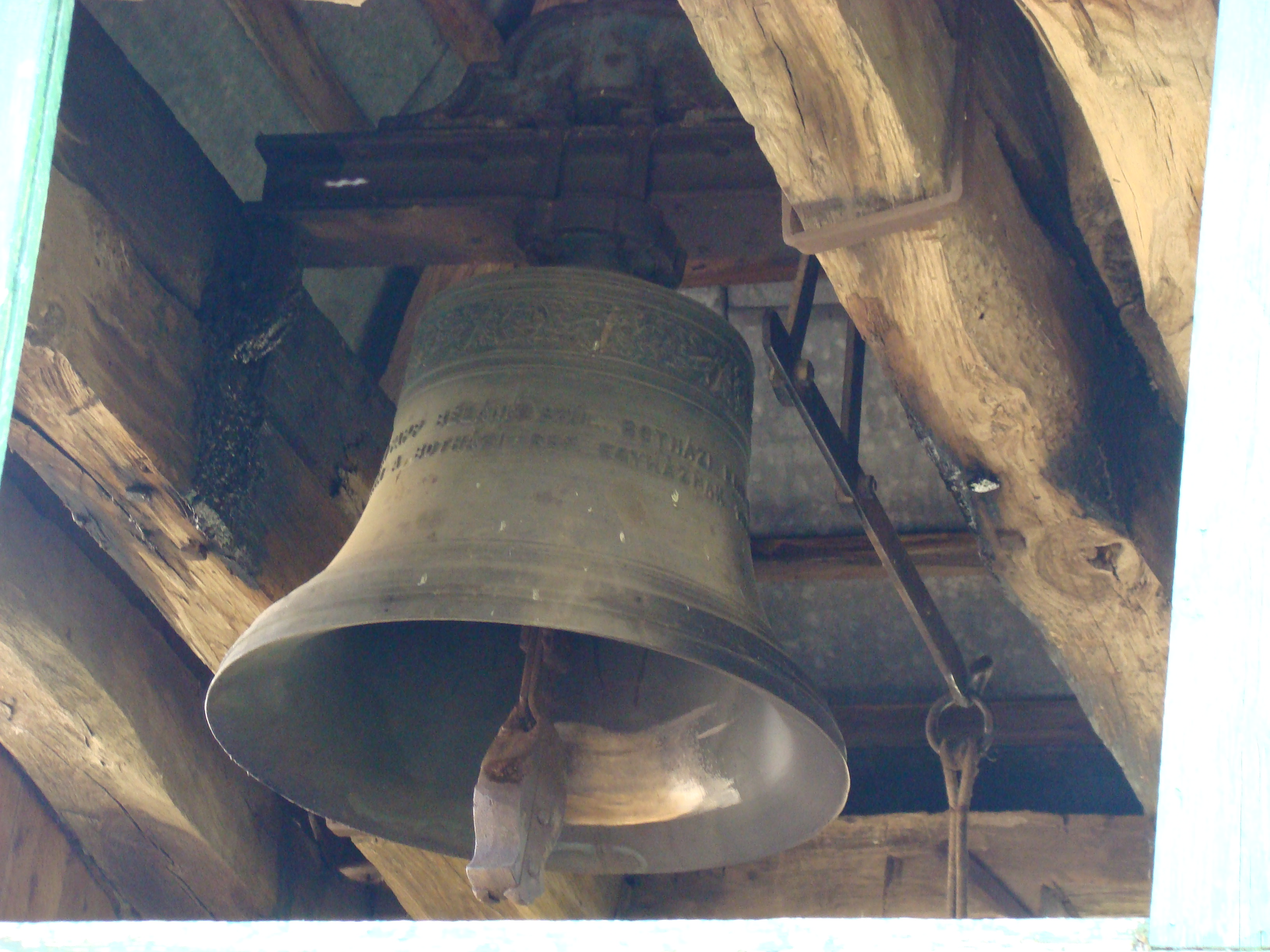 Biserica reformată din Boteni, județul Cluj